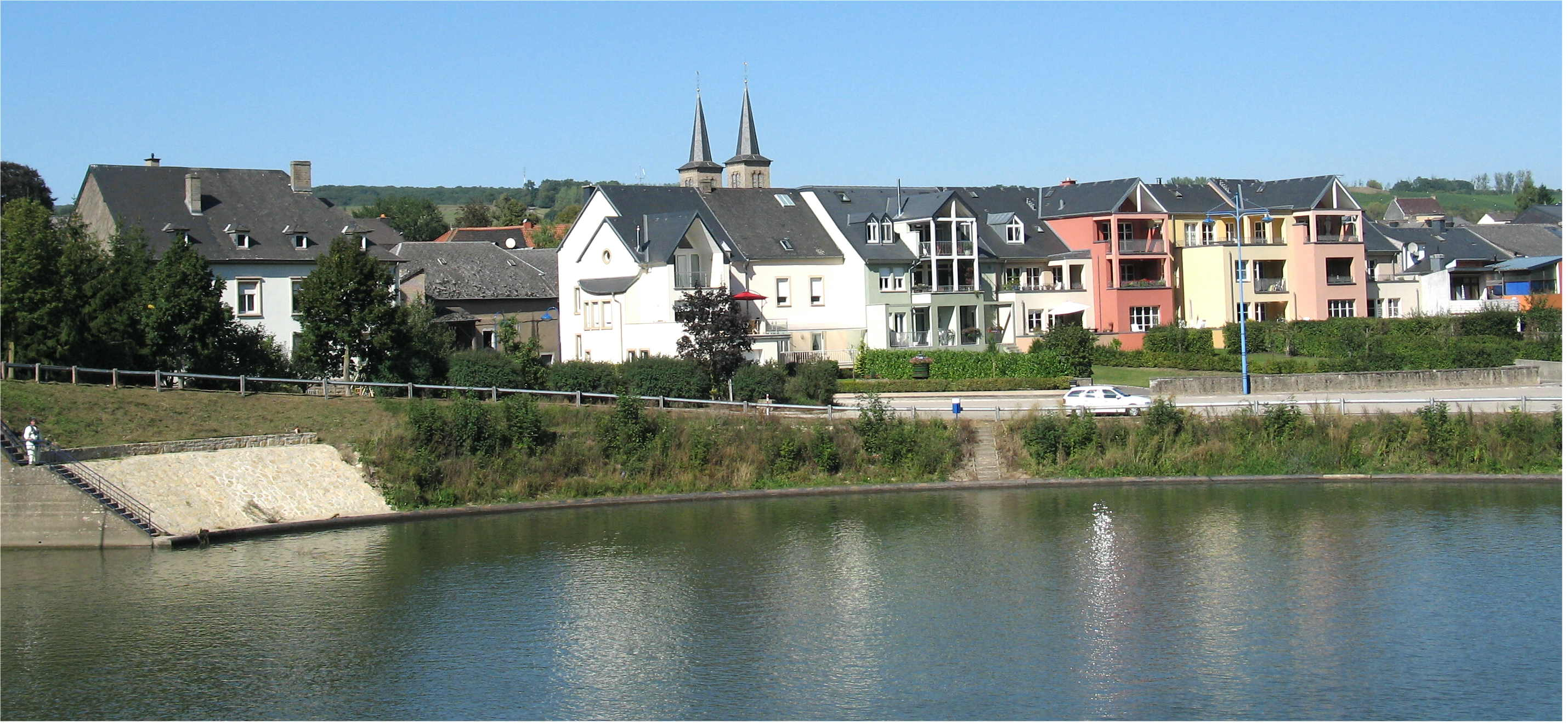 Sujet : Mäertert Source : Eege Foto lb: :lb :User : Johnny Chicago Lizenz : GFDL